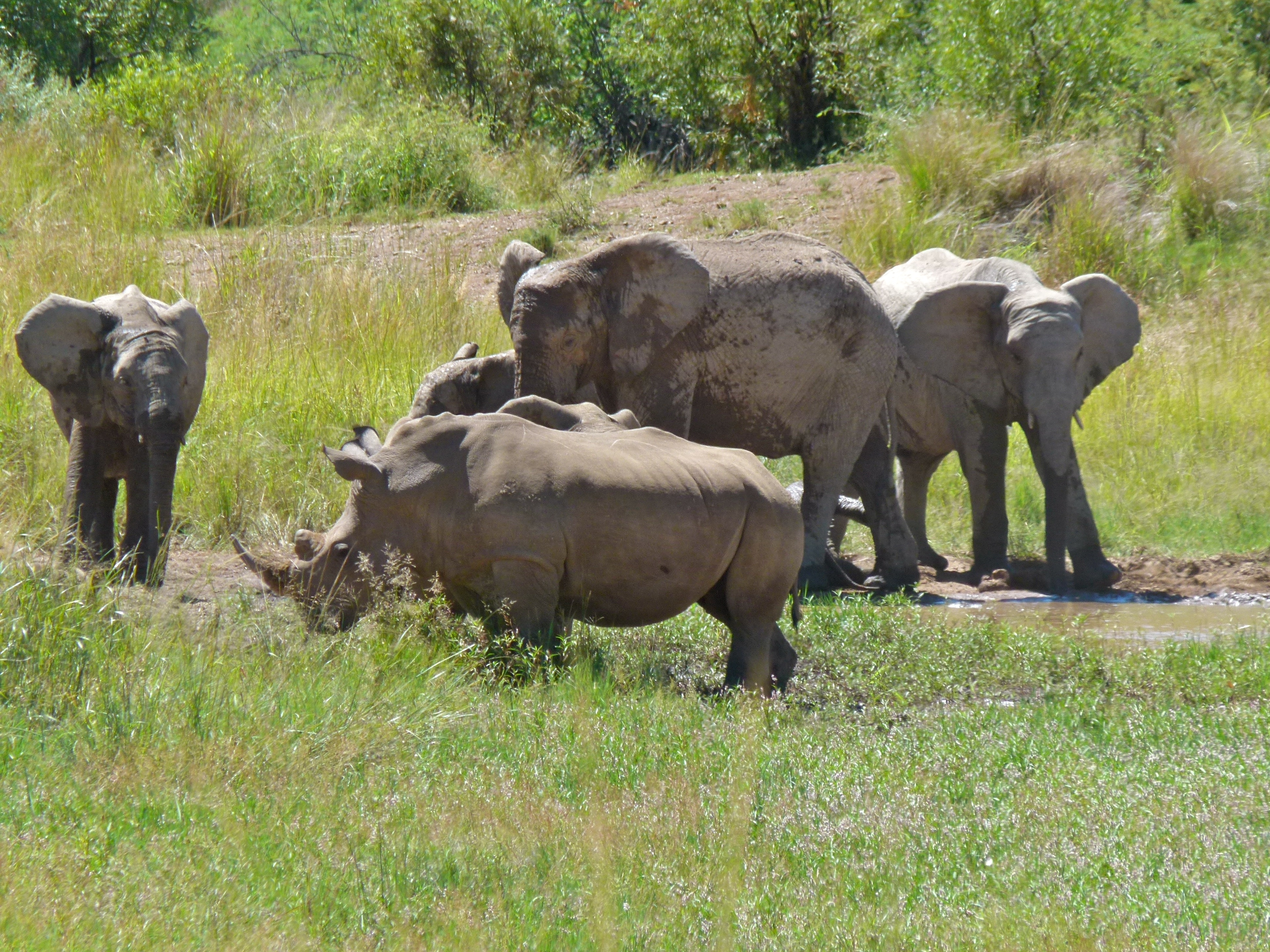 Pilanesberg, SOUTH AFRICA